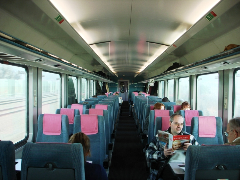 Innenraum eines Großraumwagens 2. Klasse (Bpmz) des München-Nürnberg-Expresses